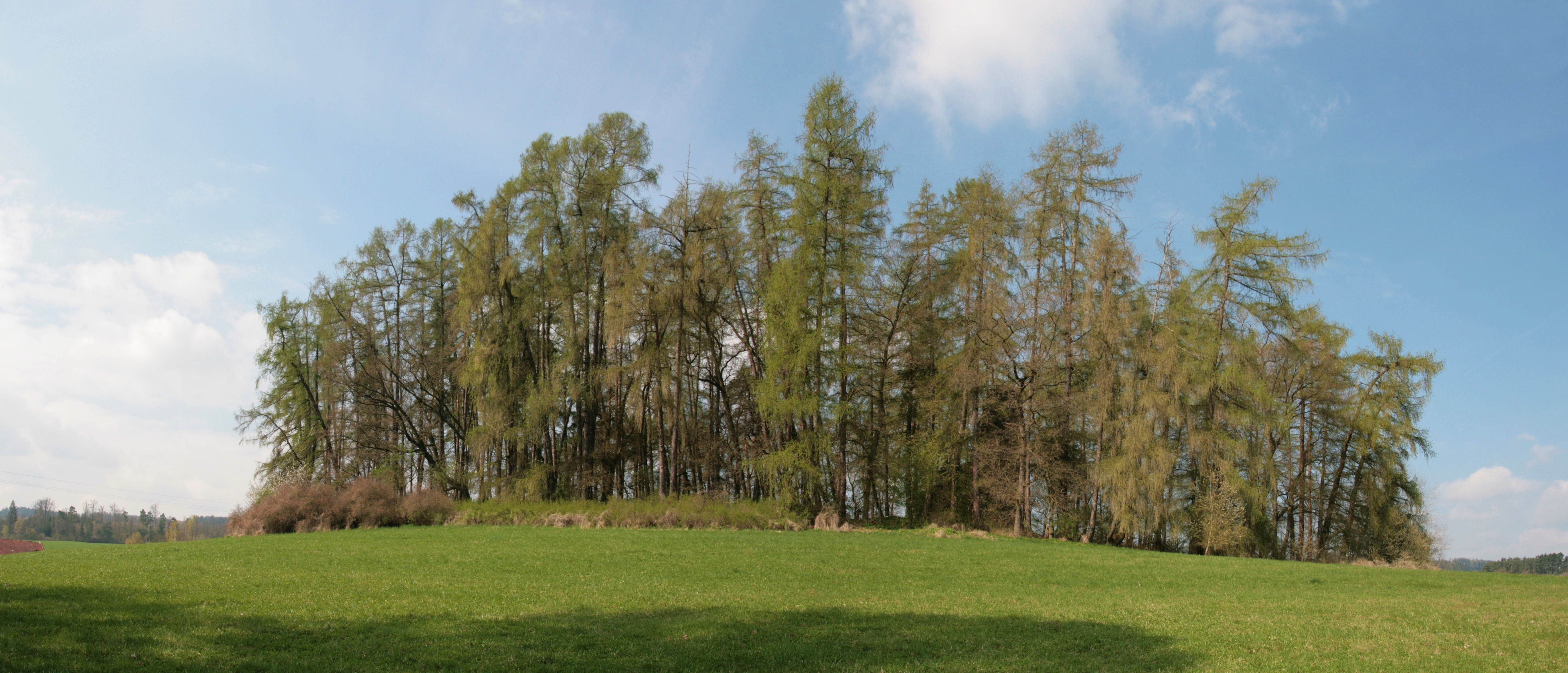 Vesnice Kašovice, část obce Hrádek u Sušice v okrese Klatovy. Zřícenina stejnojmenné tvrze na vrchu západně od vsi. Pohled od východu, ze západního okraje Kašovic.